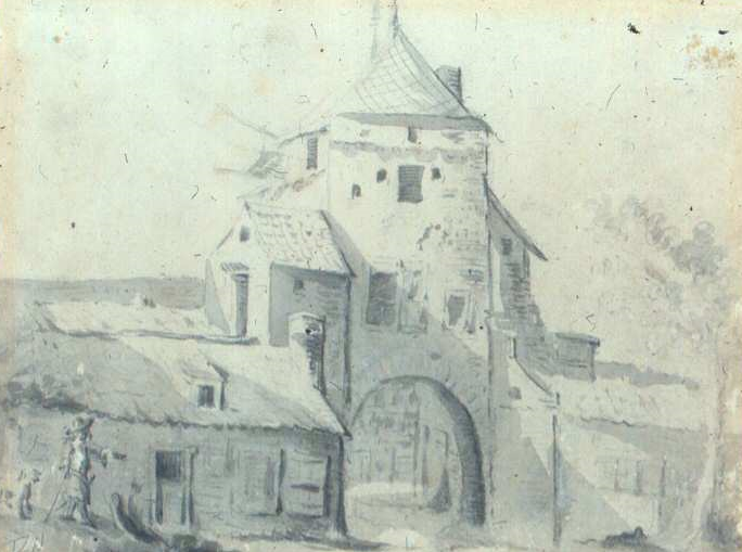 Luttekepoort vanuit de stad gezien. Techniek, afmetingen en verblijfplaats onbekend.